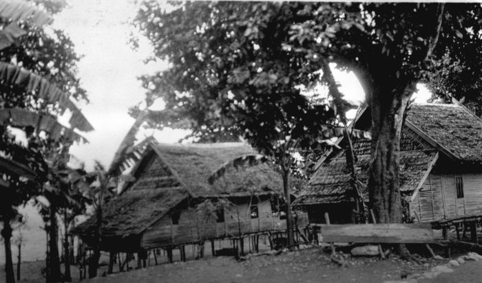 Foto. Woningen van de leproserie Watoesampe tussen Donggala en Paloe op Midden-Celebes op 7 oktober 1924.